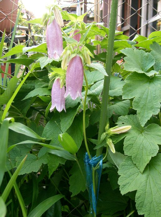 Campanula punctata